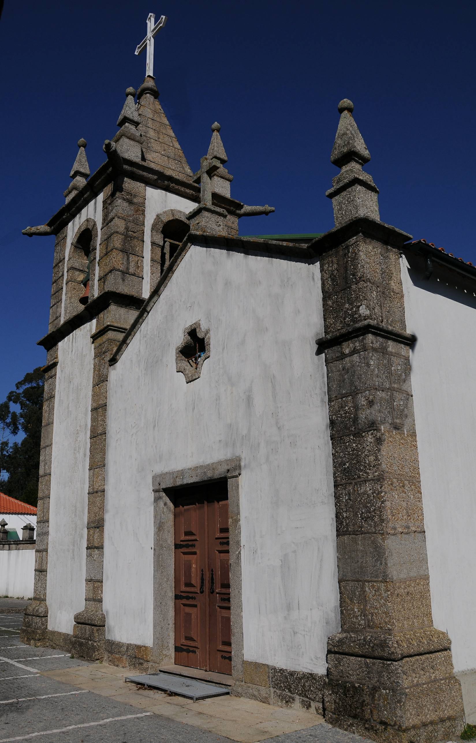 S. Vicente de Penso Church, in Braga, Portugal